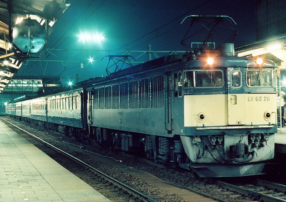 国鉄EF62 26けん引 2322列車～302列車 「妙高10号」